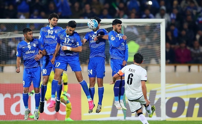 دیدار تیم های فوتبال استقلال و السد قطر